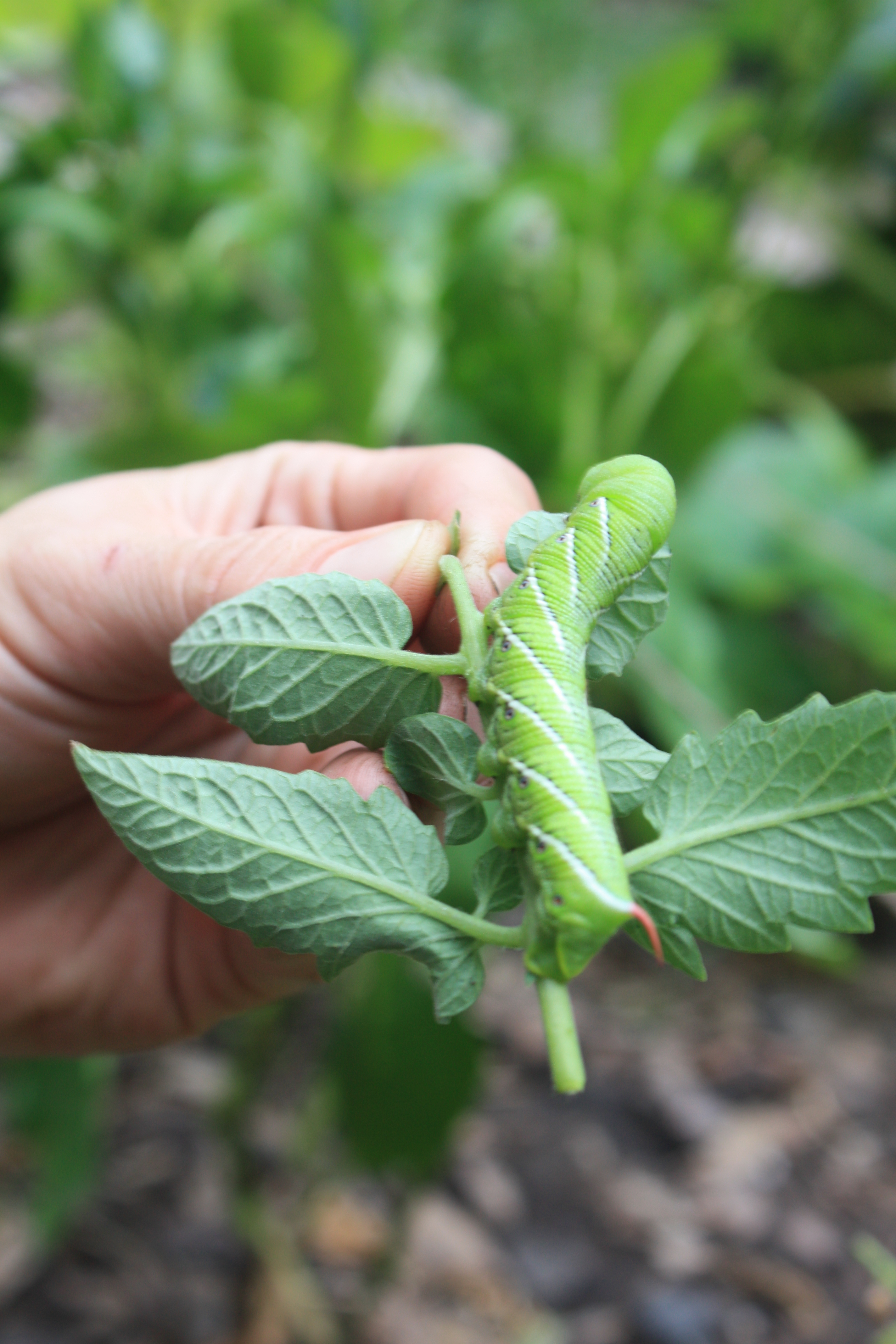 Ceratomia undulosa caterpillar